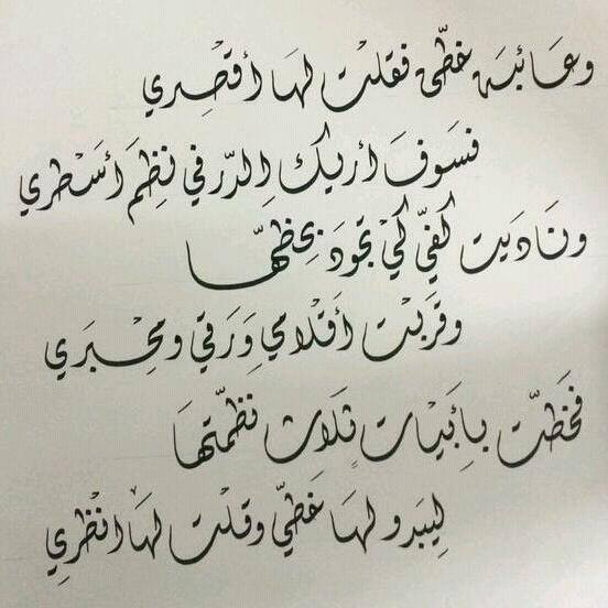 بخط يد الاستاذ الخطاط ايمن ابيات لصفية بنت عبد الله الريبي البحر: الطويل 1 وعائِبة خطّي فقلتُ لها اِقصري فـسـوفَ أُريك الدرّ في نظمِ أسطري 2 وَنـاديـتُ كفّي كي تجودَ بخطّها وقـرّبـتُ أقـلامـي ورقّـي ومـحـبـري 3 فَـخـطّـت بـأبيات ثلاث نظمتُها ليبدو لَها خطّي وقلت لها اِنظري